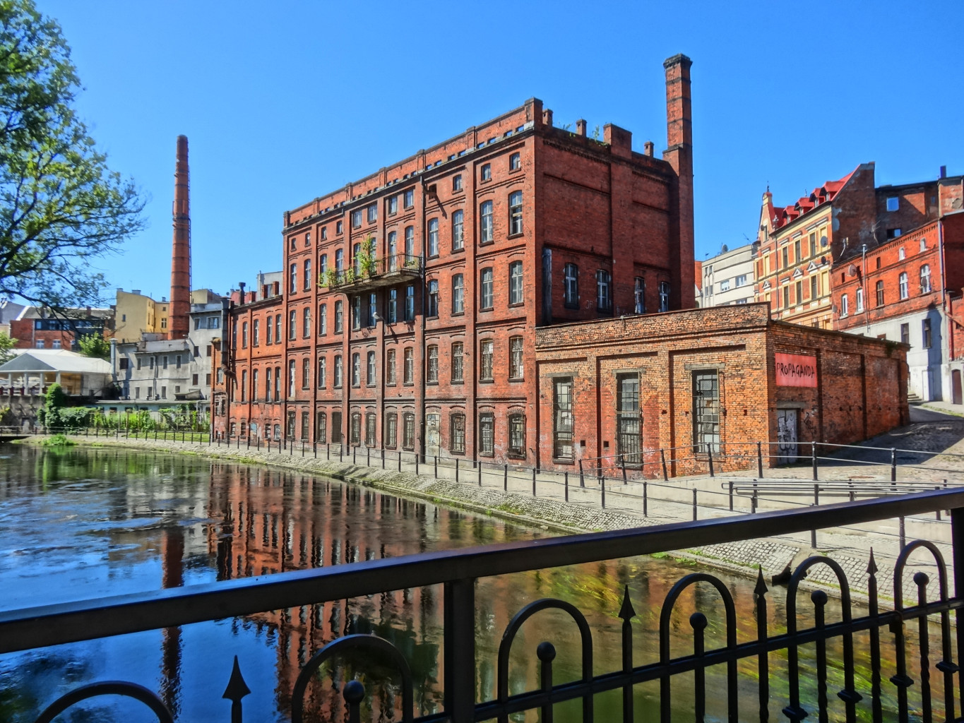 Dawna farbiarnia Wilhelma Koppa na Wyspie Młyńskiej w Bydgoszczy (przed przebudową)